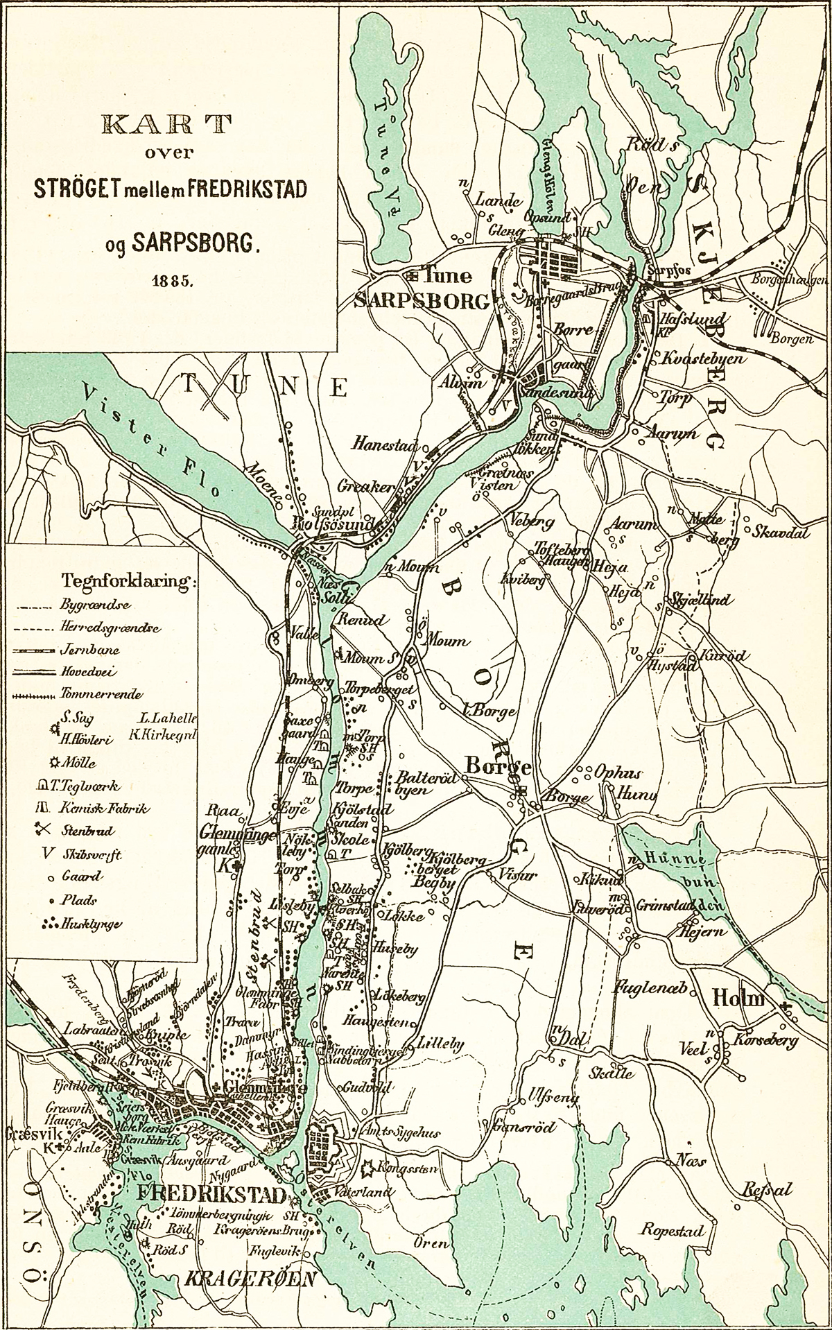 Kart over Fredrikstad og Sarpsborg, 1885.